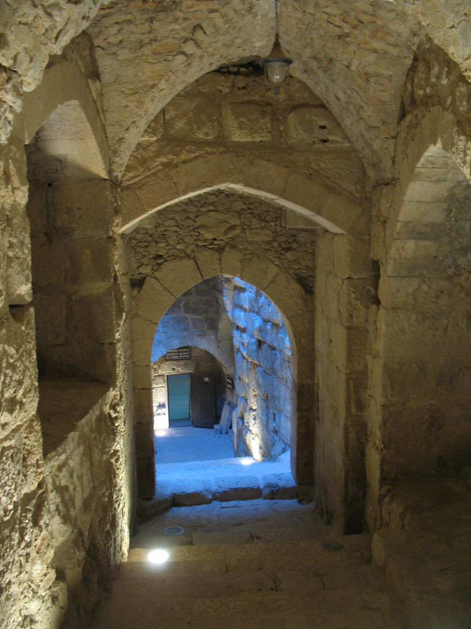 Ajlun Castle